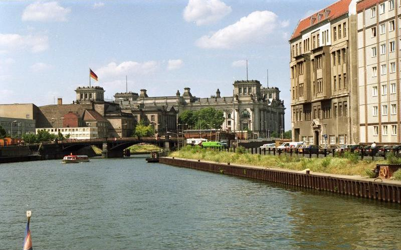 22.7.1991 Berlin-Mitte, Reichstag